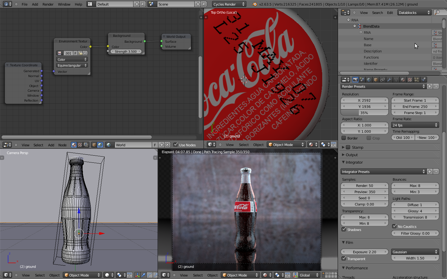 Una botella de gaseosa creada en Blender y renderizada en el motor Cycles.